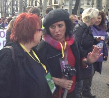 Georgina hablando con Montserrat Boix durante la manifestación del Tren de la Libertad